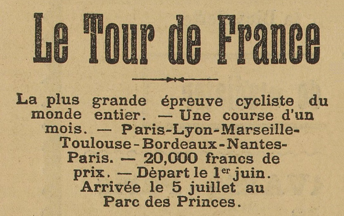 Une du journal